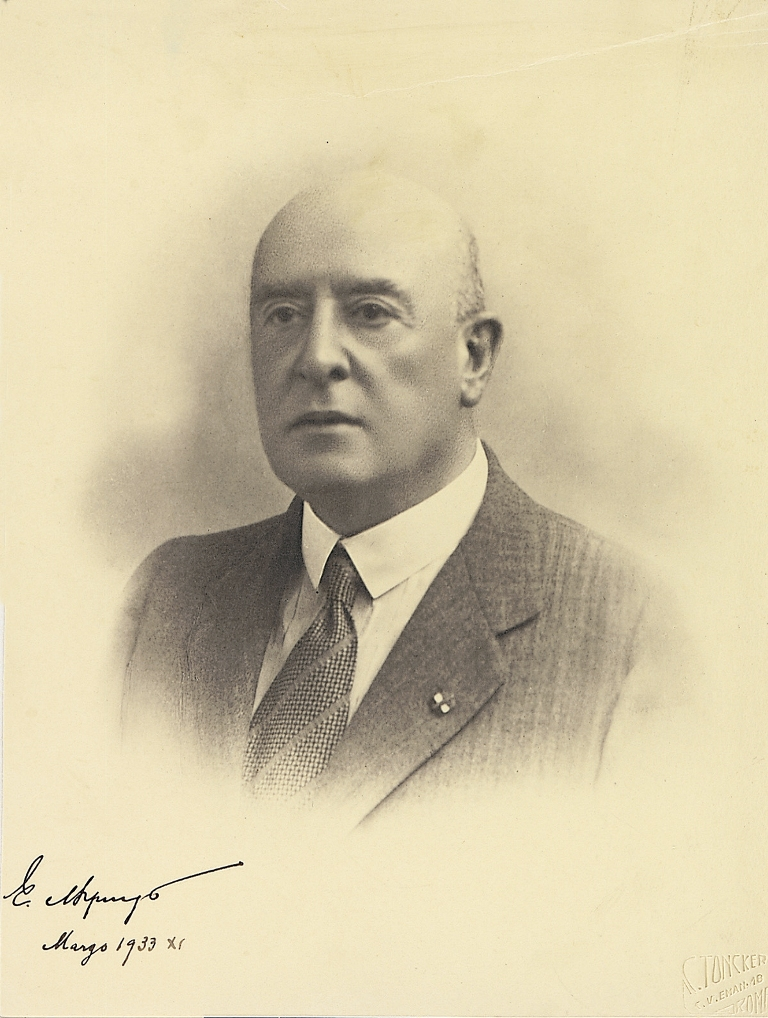 Ritratto di Edgardo Morpurgo, Presidente delle Assicurazioni Generali